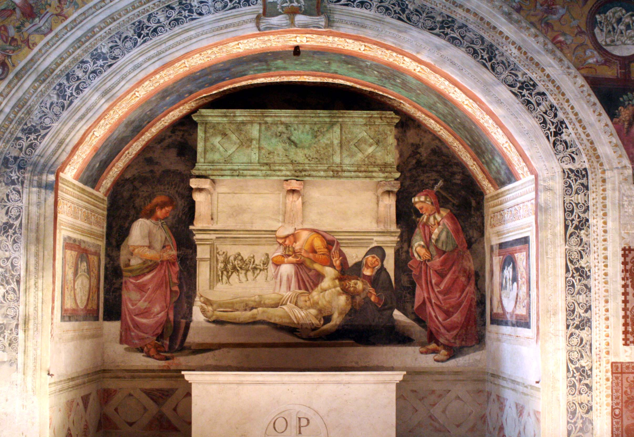 Die Grablegung Christi, Dom zu Orvieto